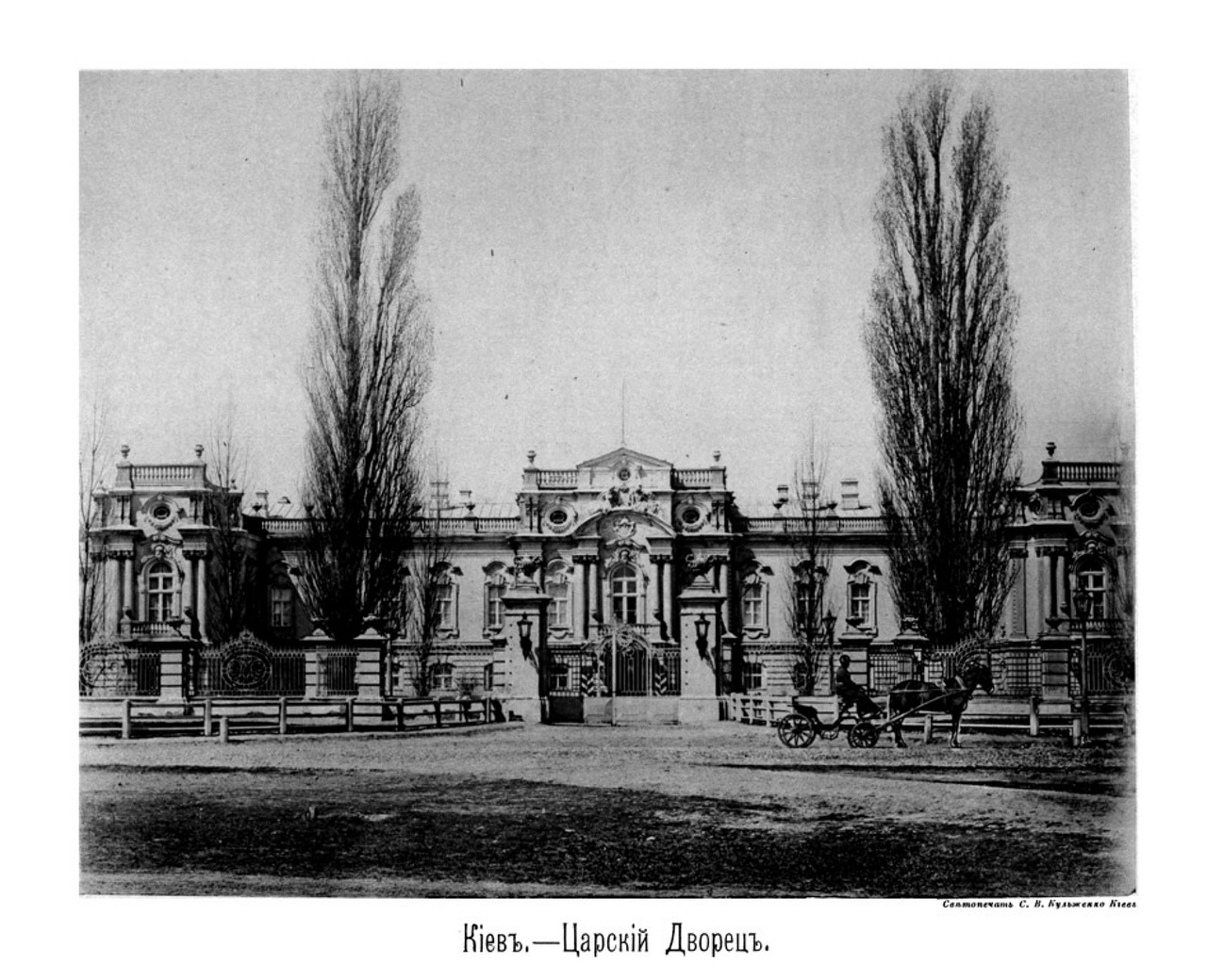 Царський (Маріїнський) палац Київ (Mariinsky palace Kyiv) 1888